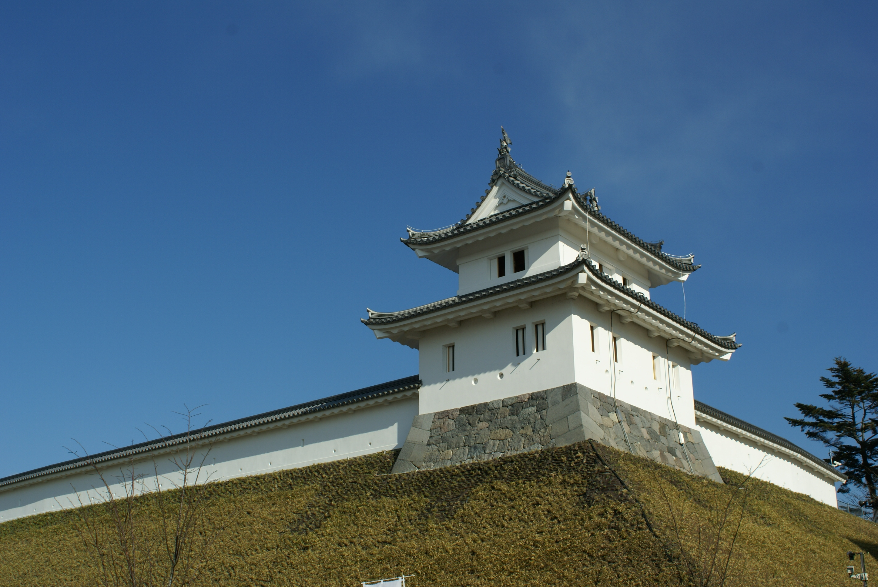 宇都宮城富士見櫓